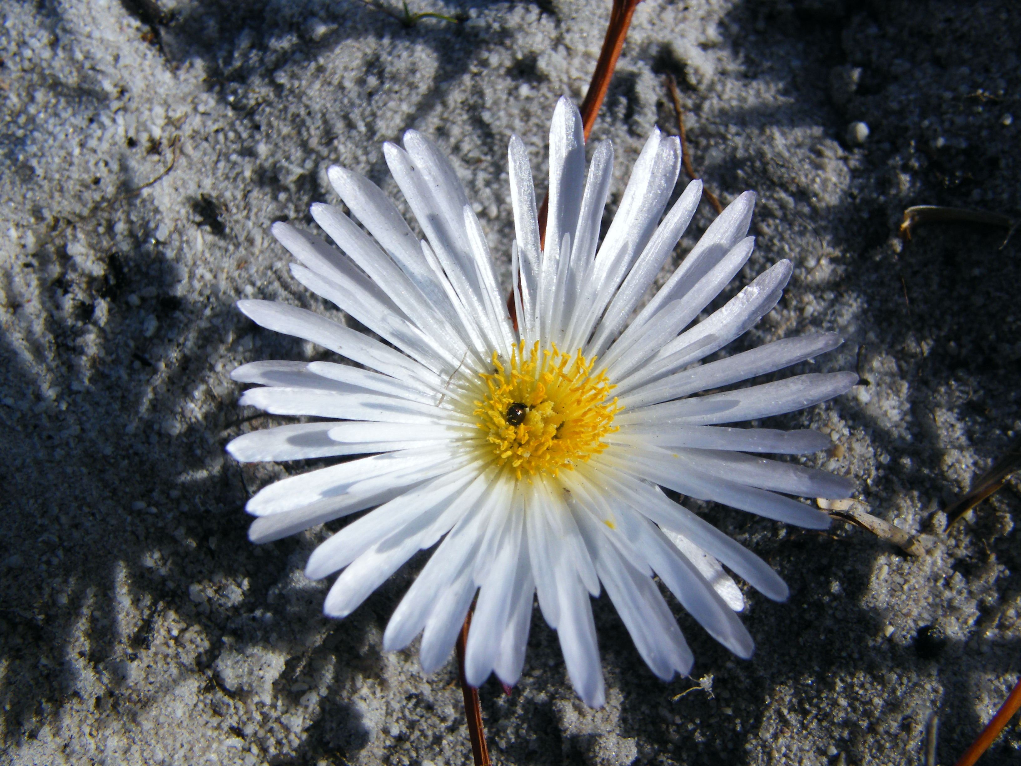 Veldkousie